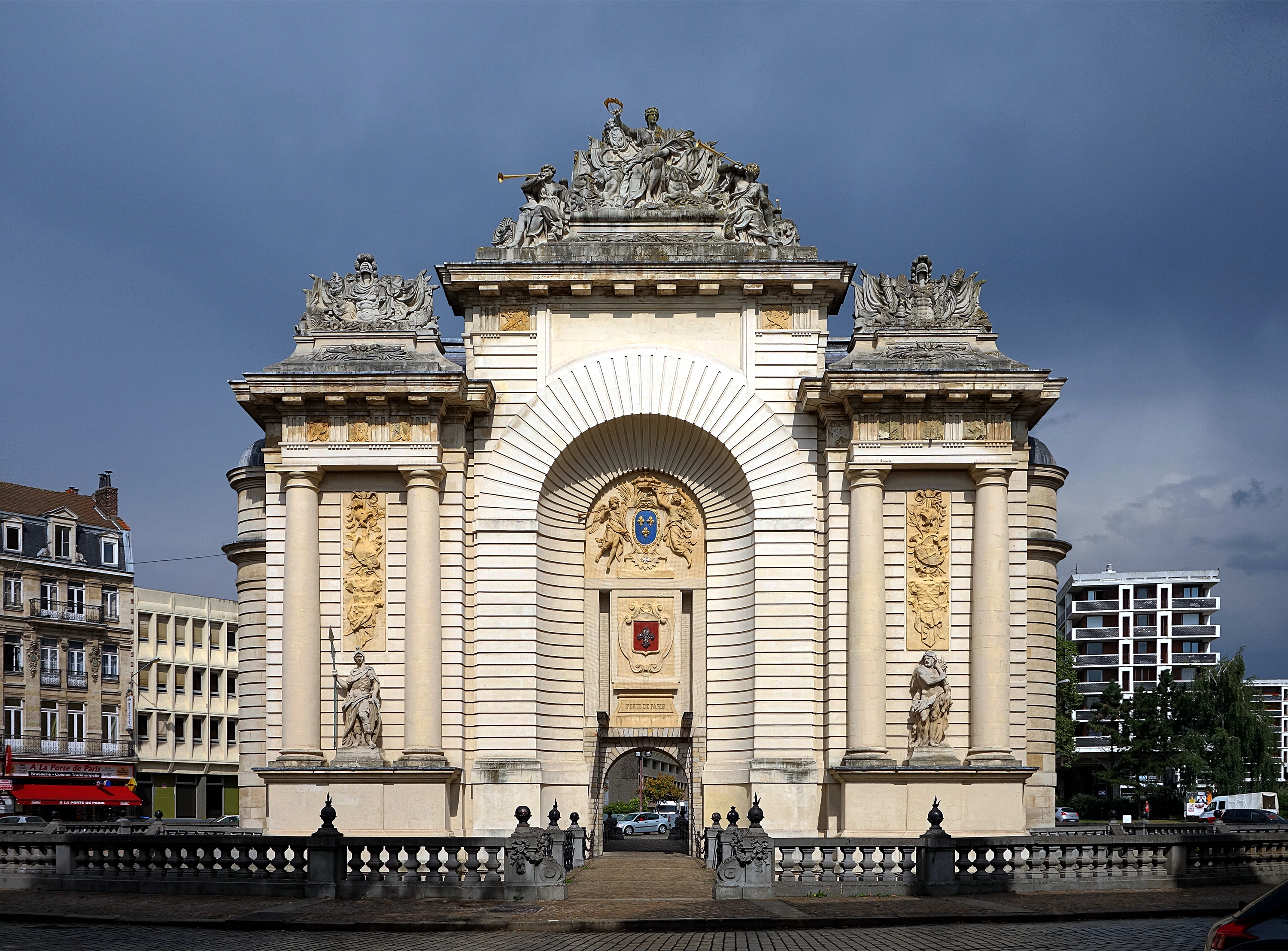 Porte de Paris (Classé) à Lille. .